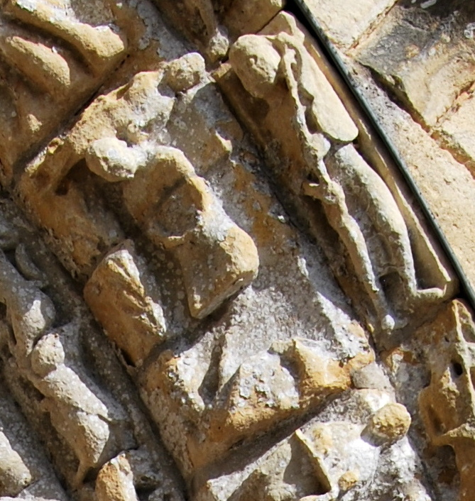 Détail du Zodiaque